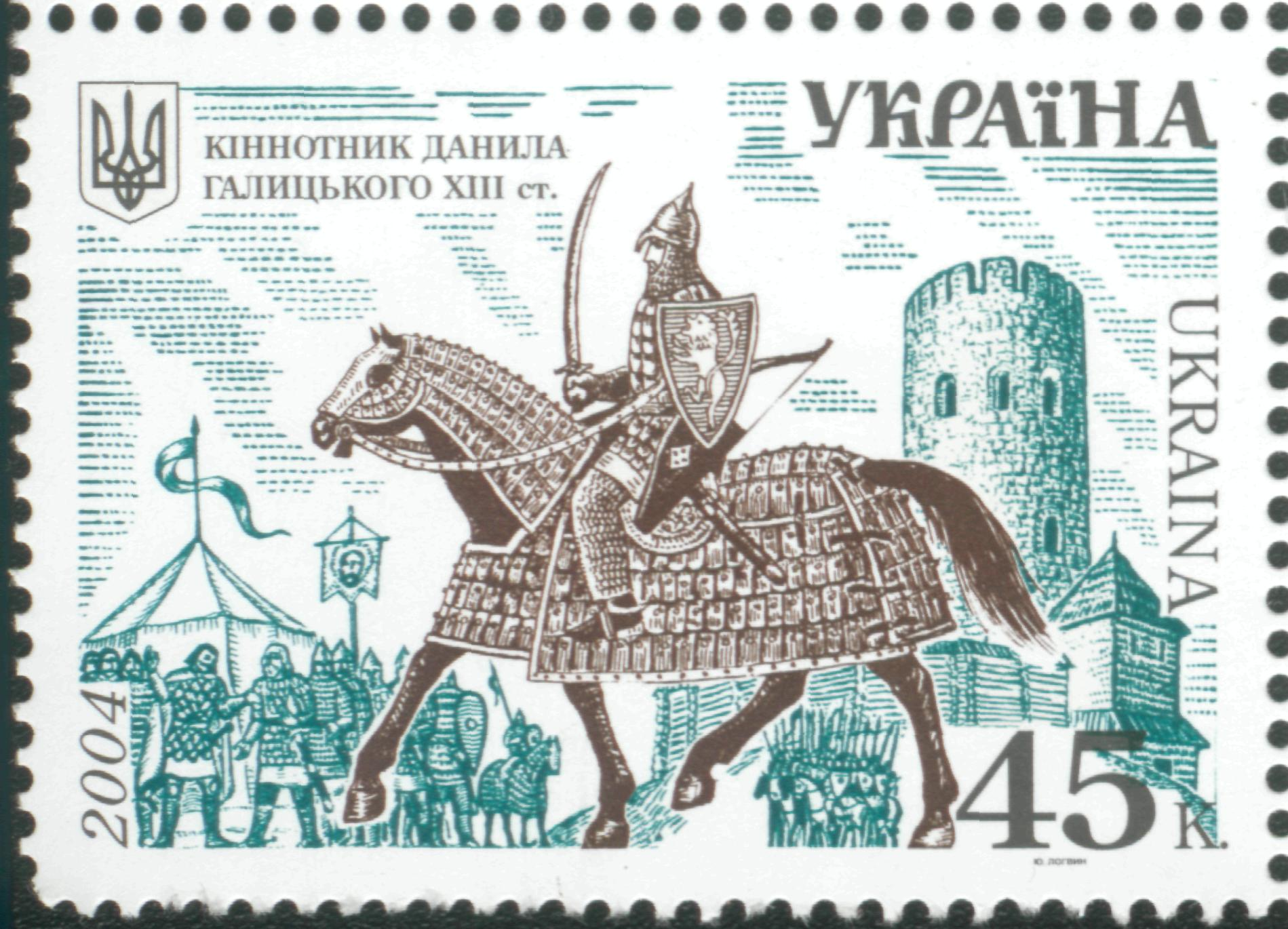 Почтовая марка из серии История Украины. Конник Даниила Галицкого 13 века.. 2004.